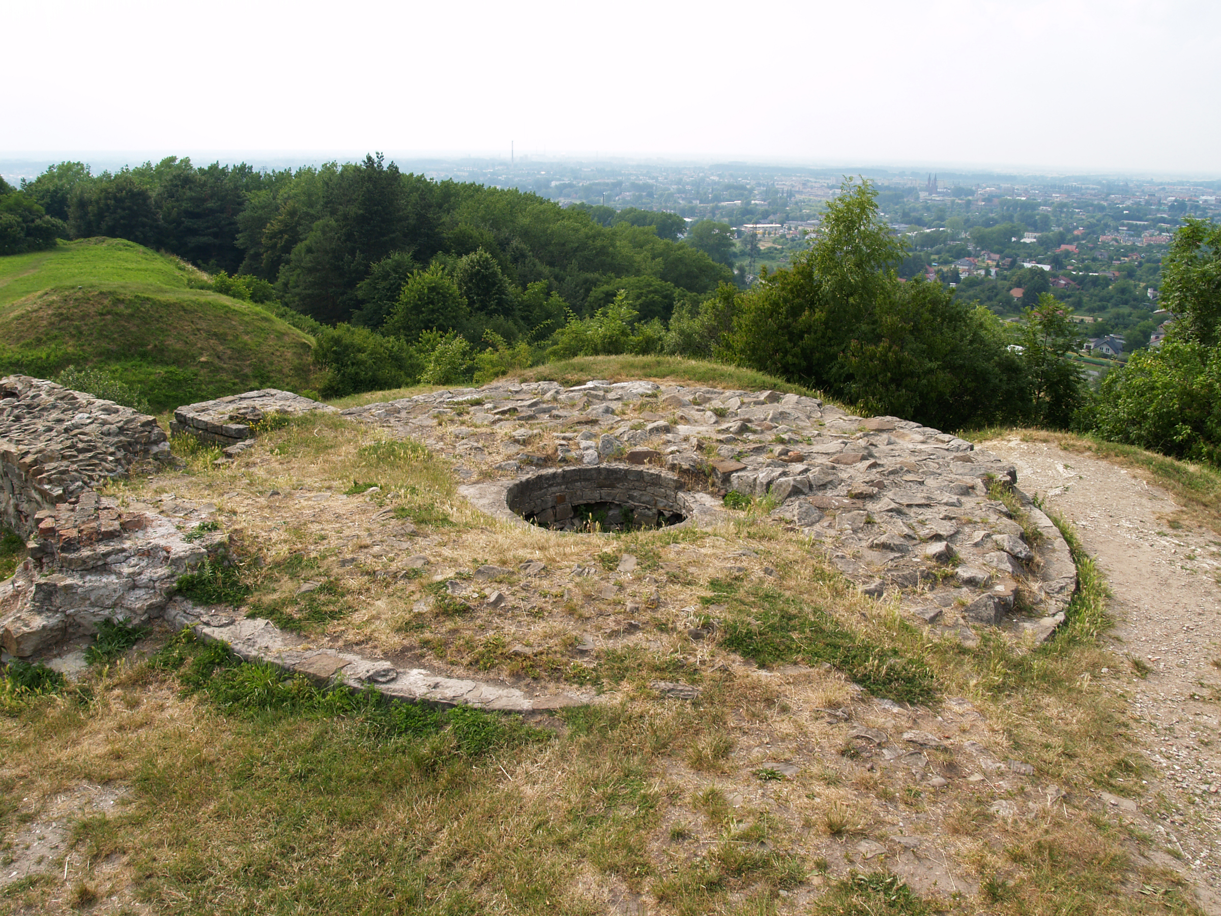 Tarnów, ul. Wypoczynkowa - ruiny średniowiecznego zamku na Górze Świętego Marcina (zabytek nr A-119 z 5.10.1976)